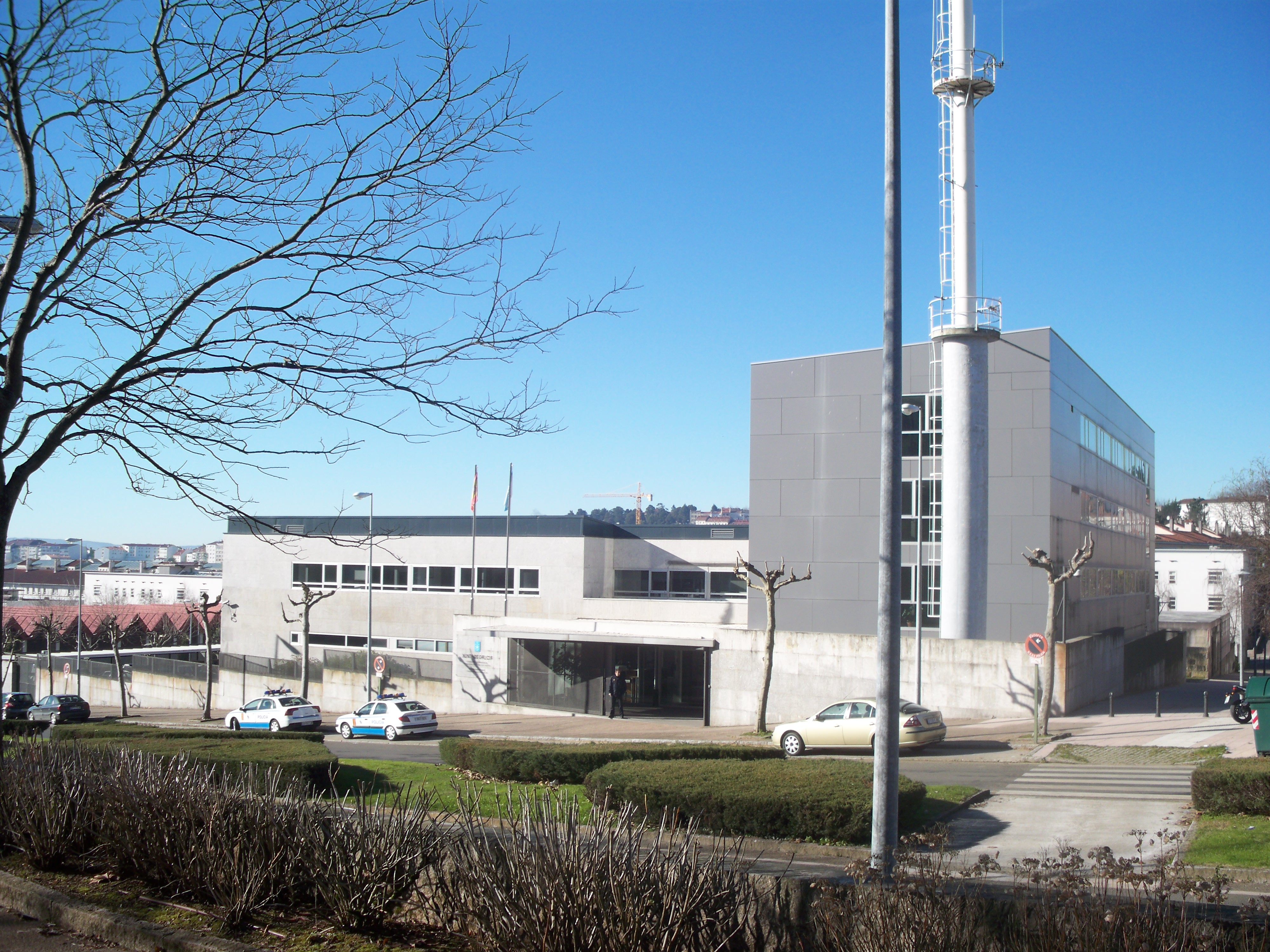 Sede central da Policía Autonómica Galega en Santiago de Compostela